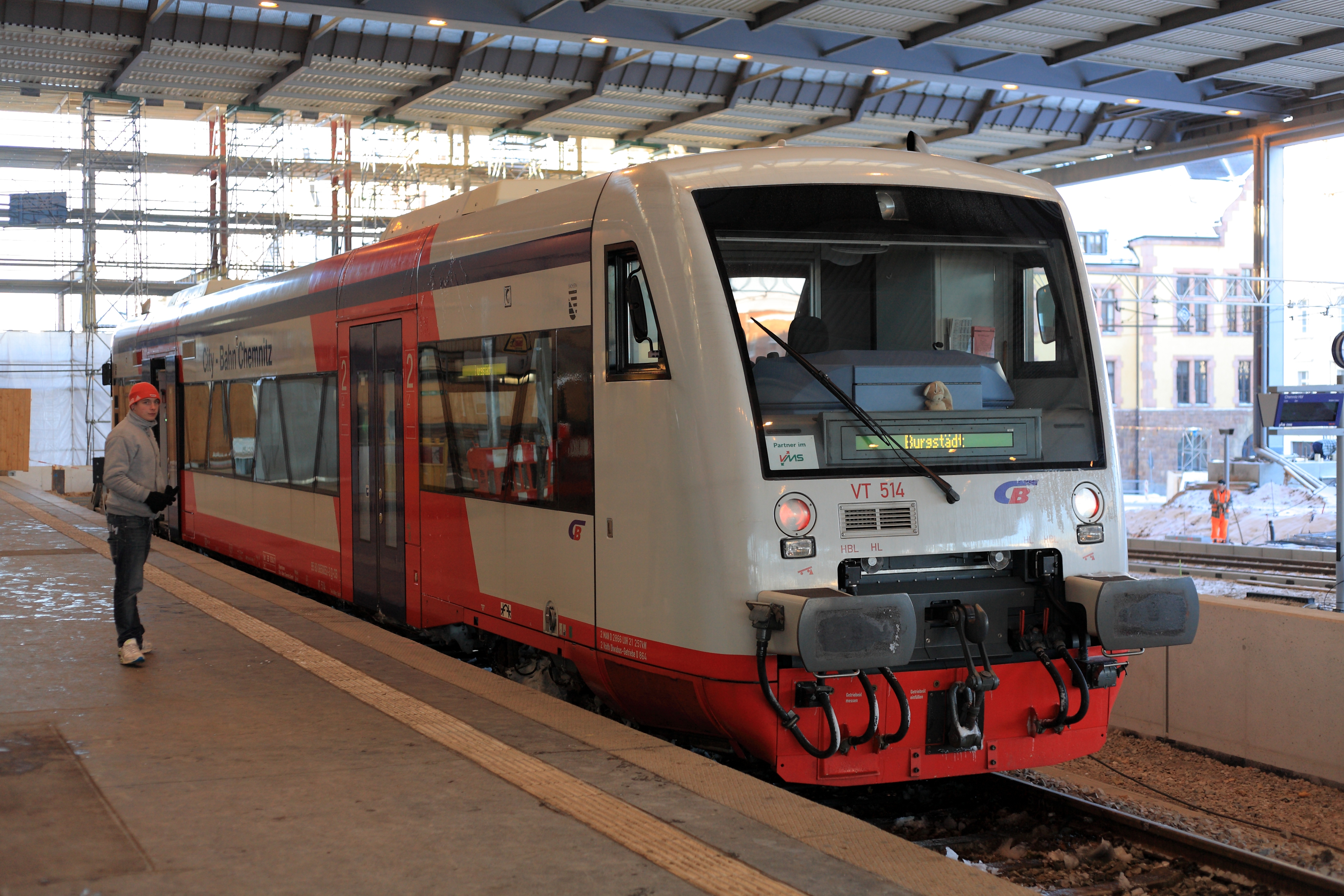 »Citybahn«-Triebwagen abfahrbereit nach Burgstädt, noch vom Fernbahnteil des Bahnhofes Chemnitz Hbf. Das Gleis 28 (Bahnsteig 5) ist seit Beginn der Umbauarbeiten nicht mehr elektrifiziert.